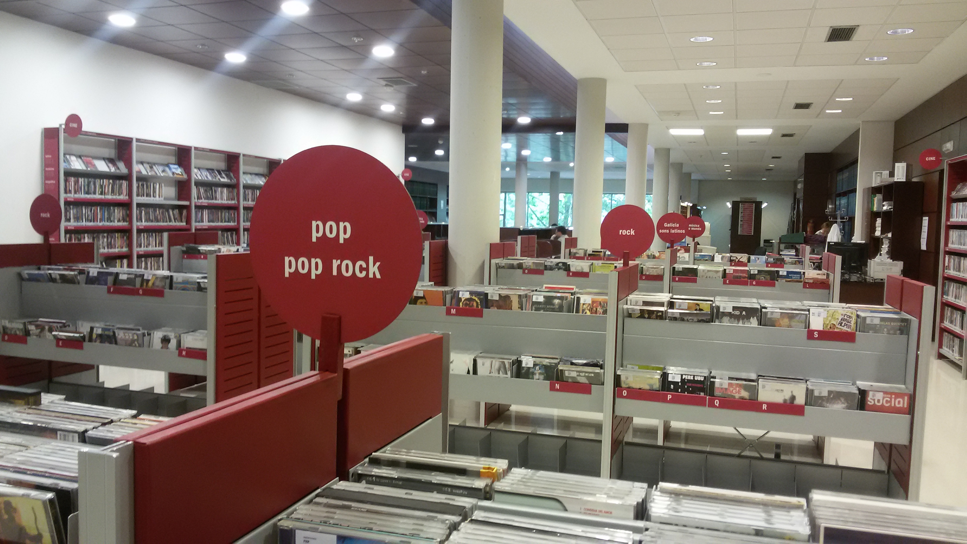 Fonoteca e Hemeroteca da Biblioteca Pública da Coruña